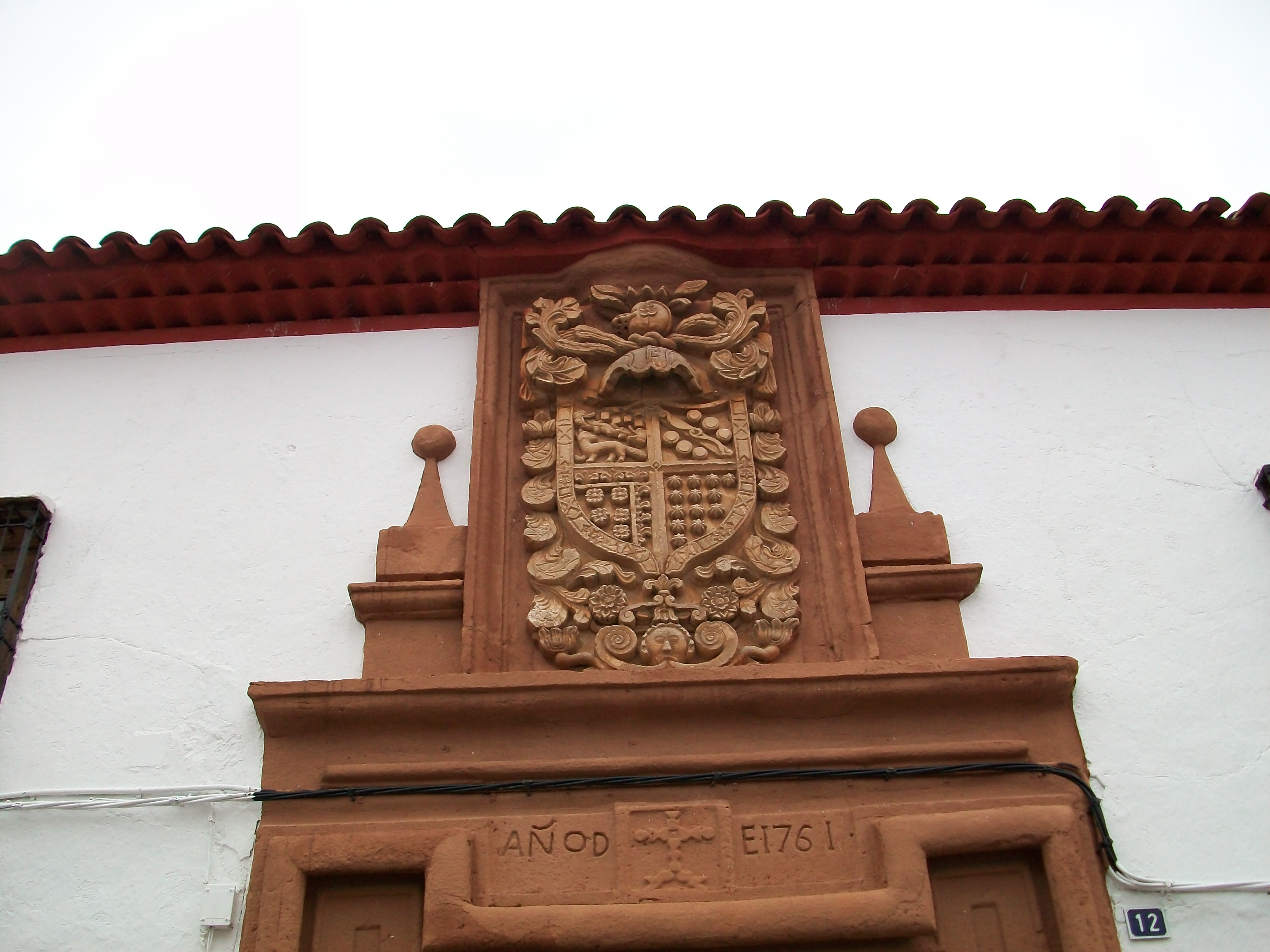 Escudo de la Casa de la Paca en Pedro Muñoz (Ciudad Real)